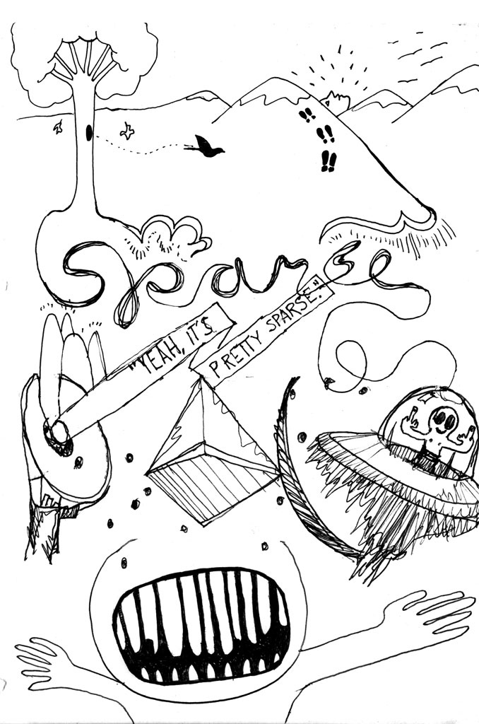 A four-person exquisite corpse drawing.